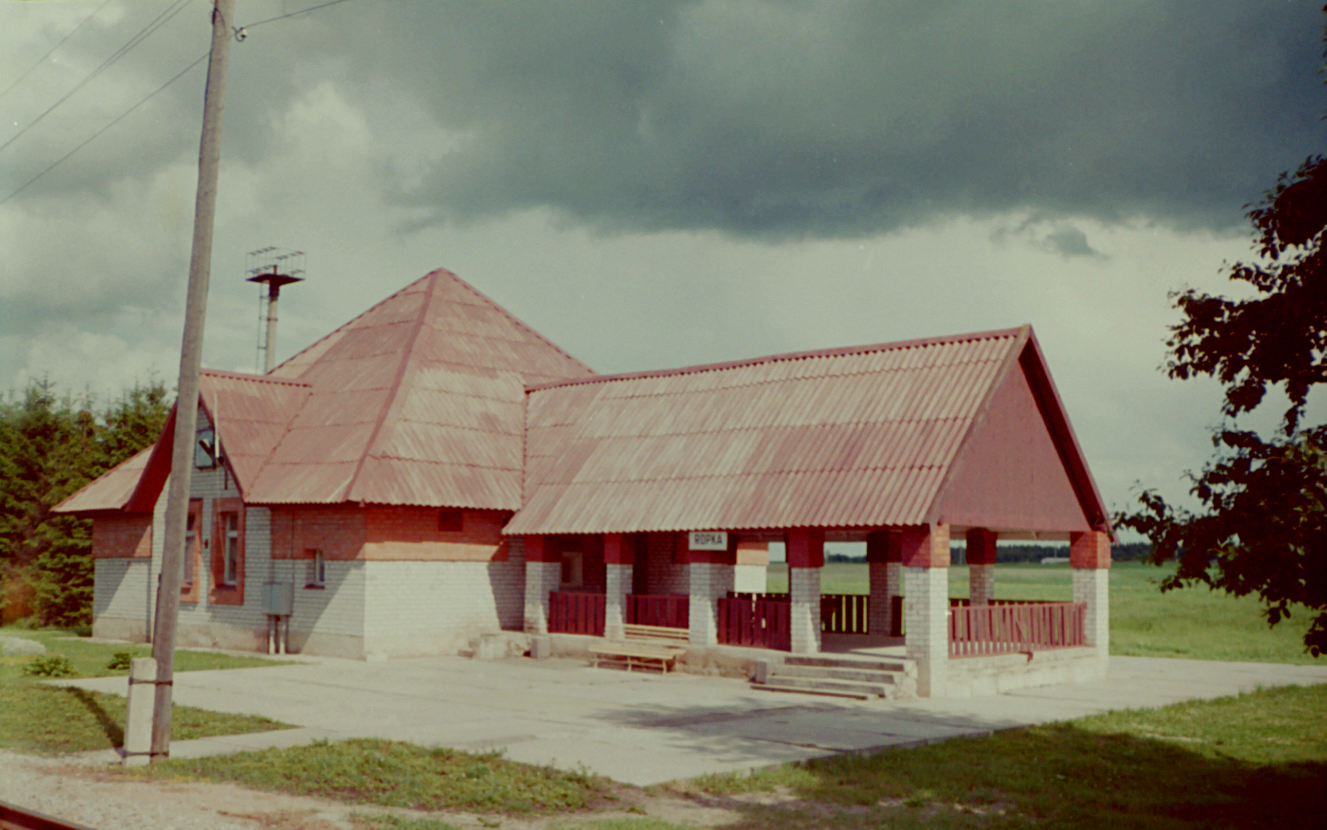 Ropka jaamahoone